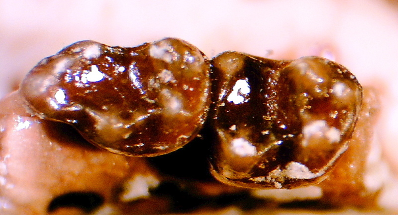 Omomys sheai Gazin